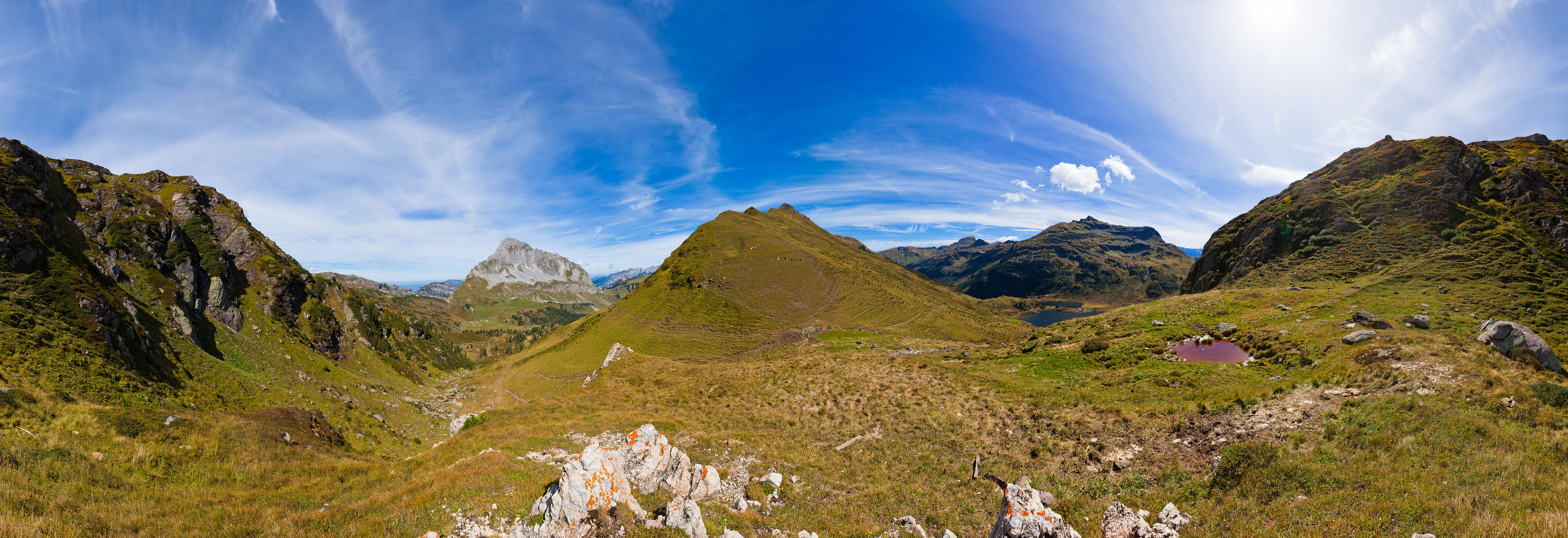 Murgseefurggel 360°